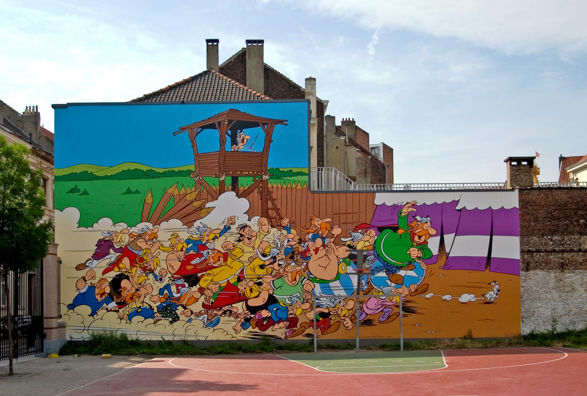 Figuren aus den „Asterix und Obelix“-Comics von Goscinny und Uderzo, Comicwand in Brüssel, 33 rue de la Buanderie